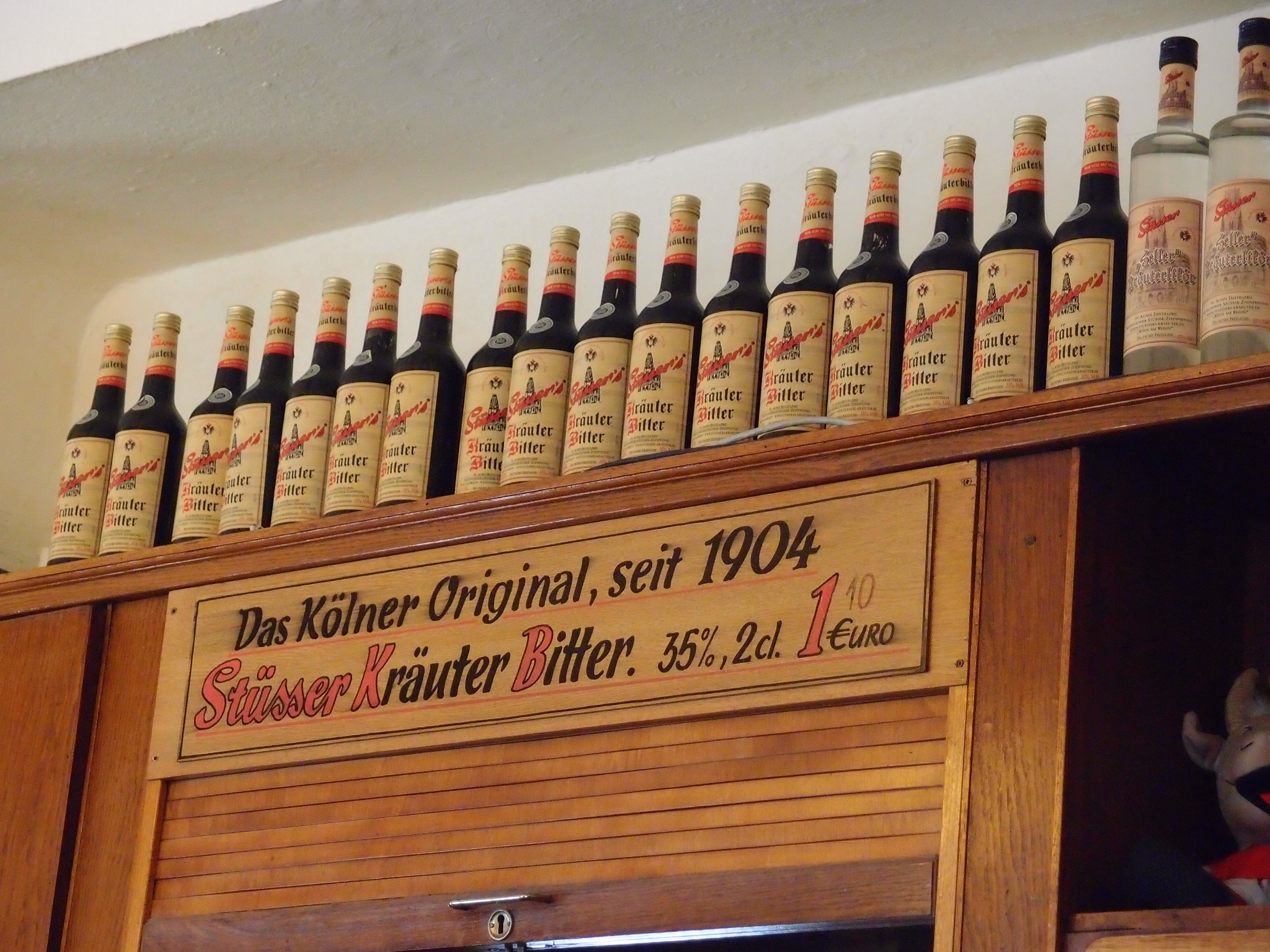 Brauhaus Stüsser im Agnesviertes (Köln) - Stüsser`s Kräuterbitter im Regal Datum: 08.04.2012 Urheber: M. Pfeiffer alias Benutzer:Gordito1869 Quelle: privates Fotoarchiv des Urhebers Garantieerklärung des Urhebers: es handelt sich um ein authentisches Originalfoto, das nicht via Fotomanipulation verändert wurde